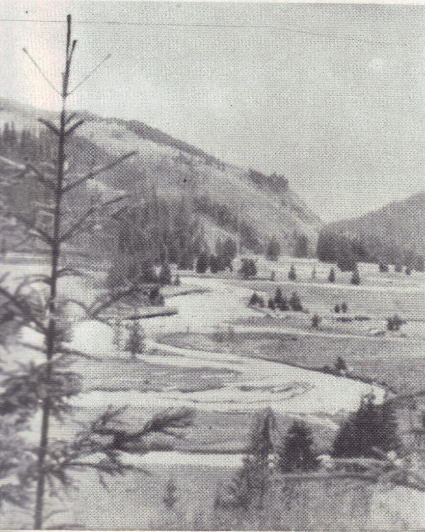 Valea Frumoasei. Fotografie executată după un clișeu existent la Muzeul de literatură al Moldovei din Iași.